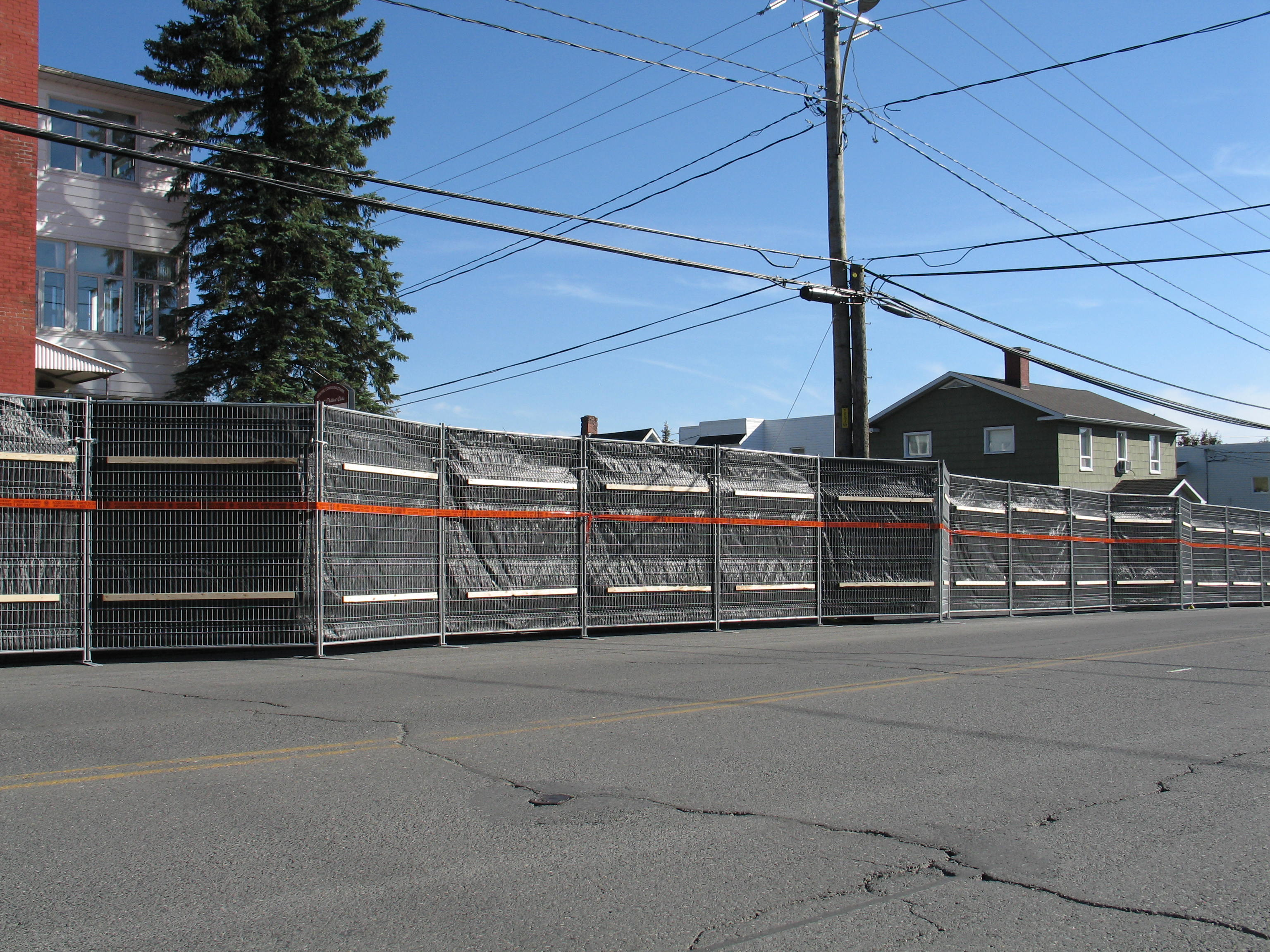 Une haute clôture ceinture le périmètre de la «zone rouge», considérée comme une scène de crime par la police à la suite de l'accident ferroviaire du 6 juillet 2013 à Lac-Mégantic, Québec.